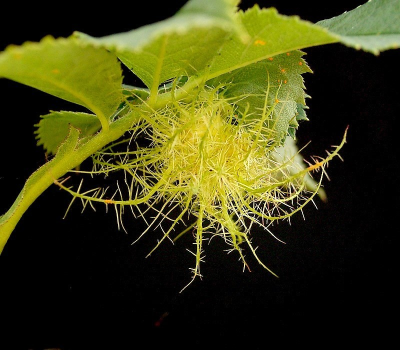 Diplolepis rosae on Rosa canina